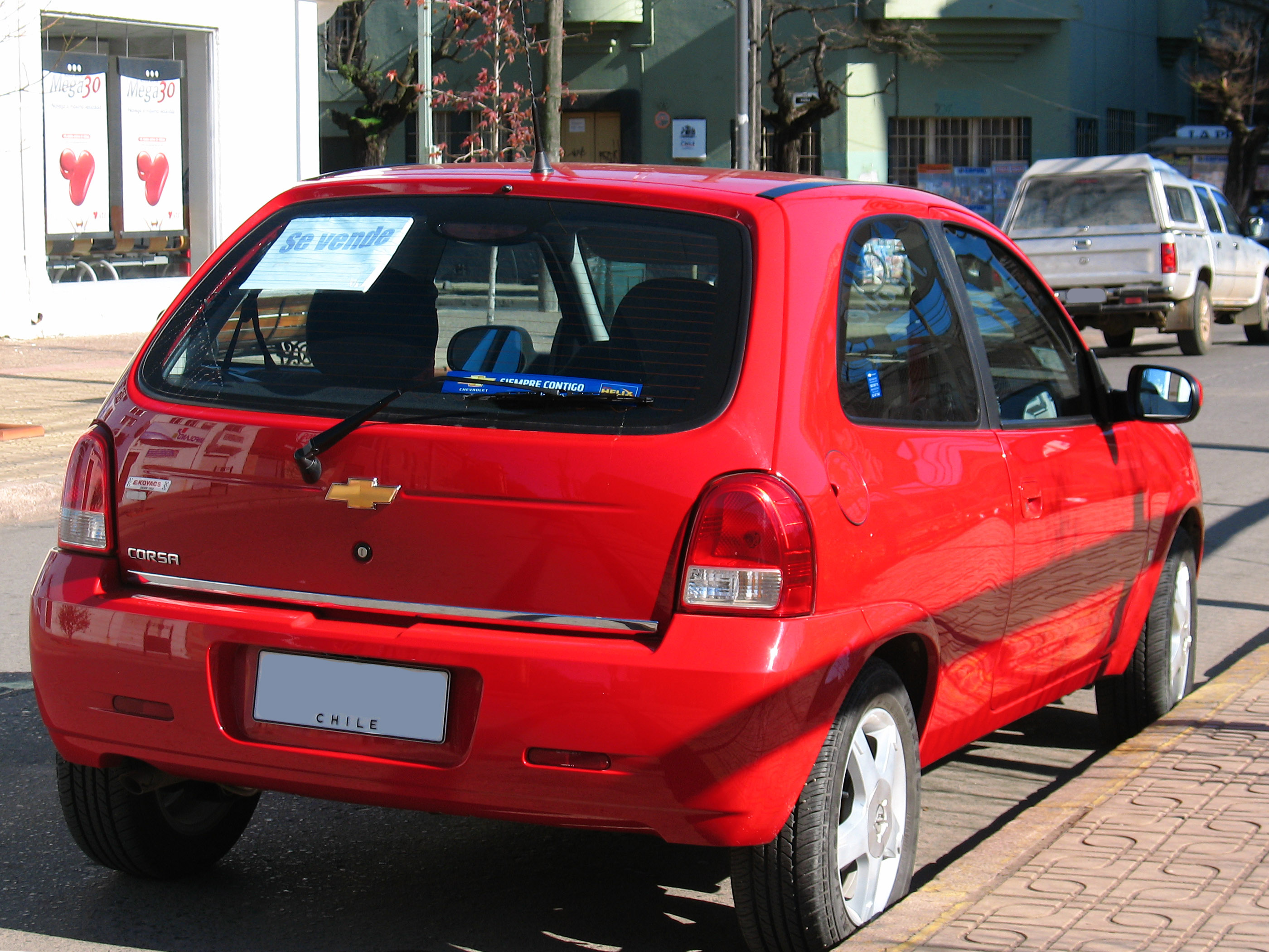 Mexican-made Corsa